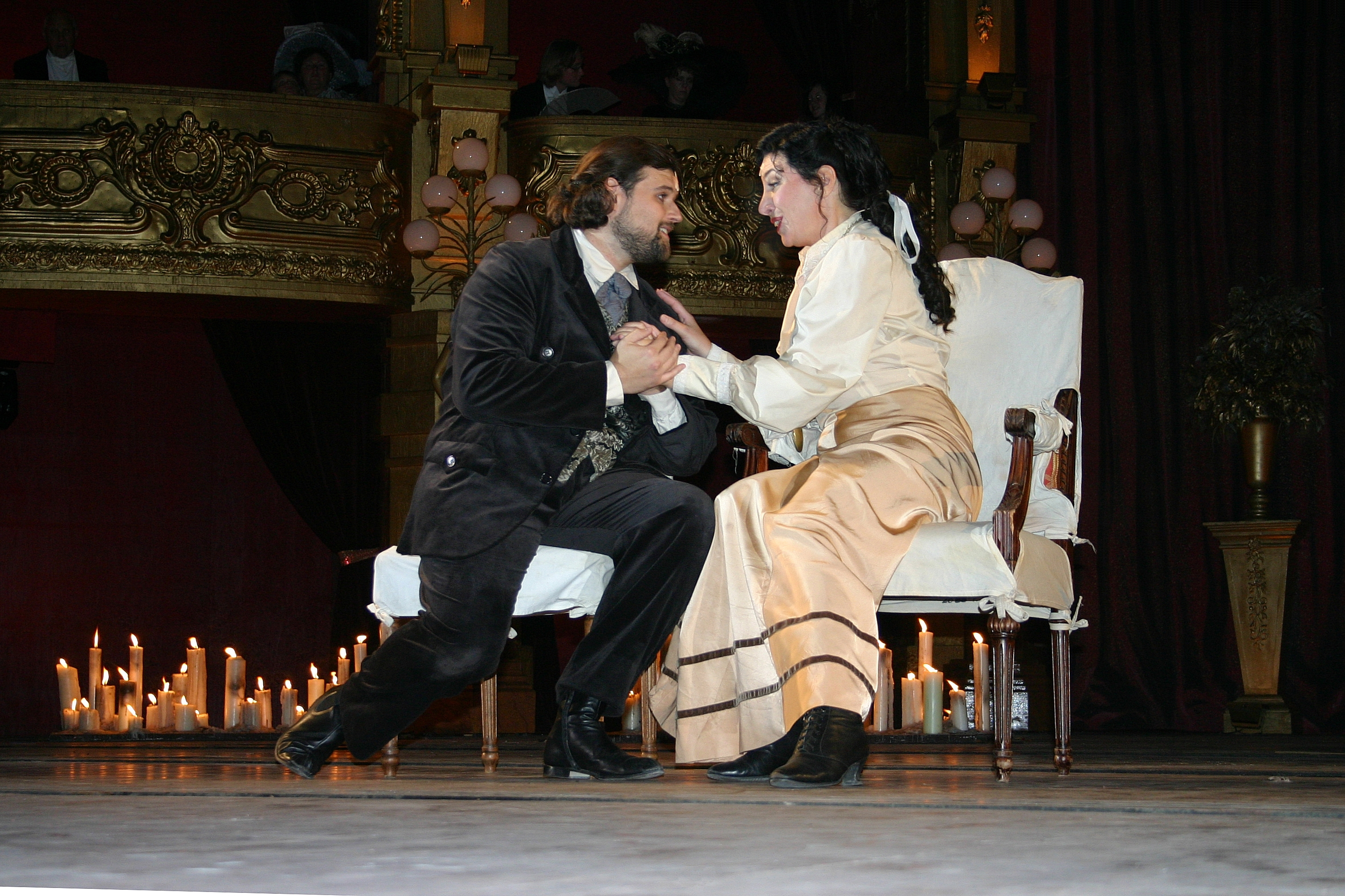 La Traviata - Alfredo Germont und Violetta Valerie. 31. Juli 2008 auf der Freiluftbühne der Opern-Festspiele im Römersteinbruch in Sankt Margarethen.